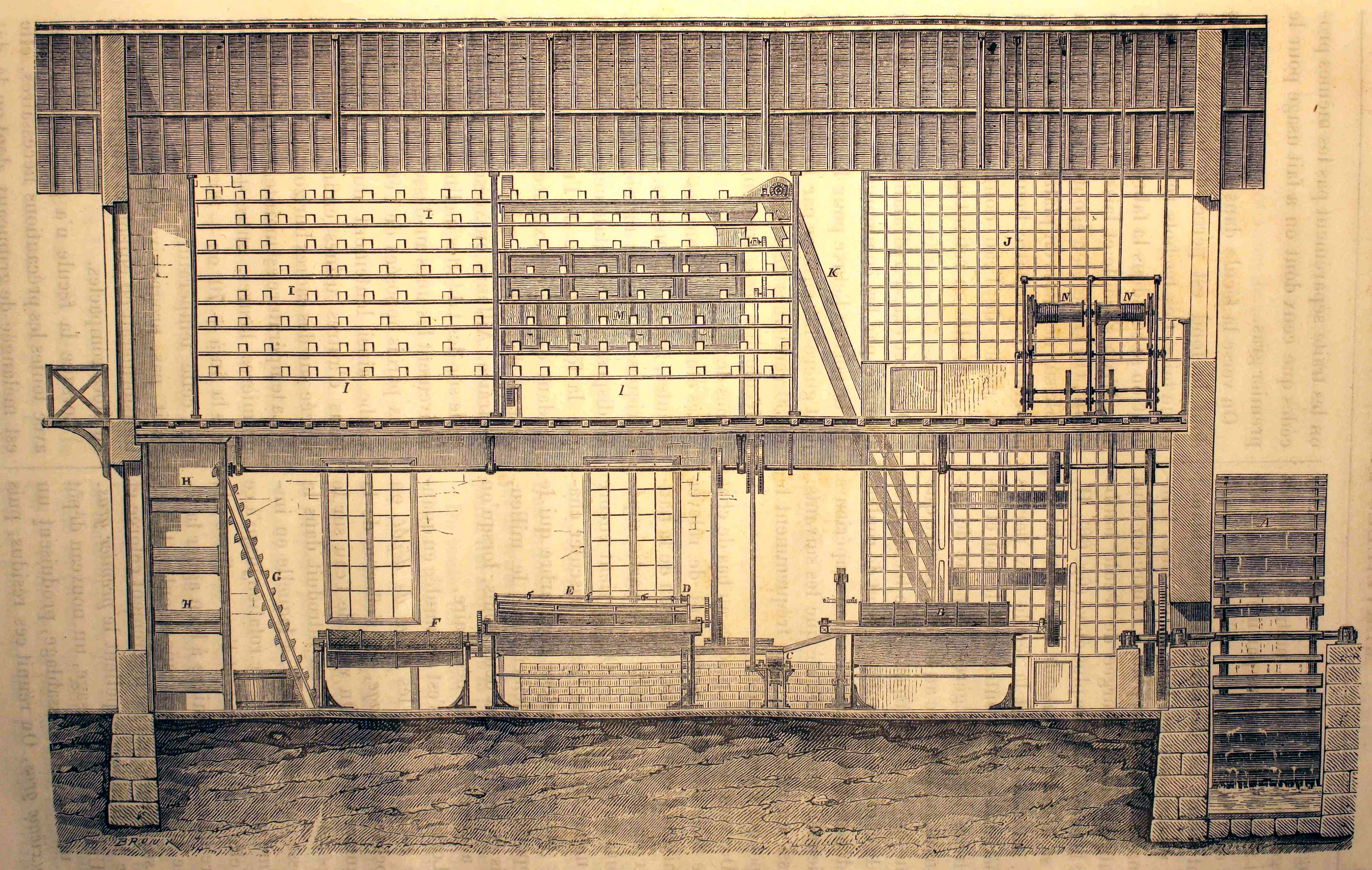 Ilustraciones de la obra : Les merveilles de l'industrie ou, Description des principales industries modernes / par Louis Figuier. - Paris : Furne, Jouvet, [1873-1877]